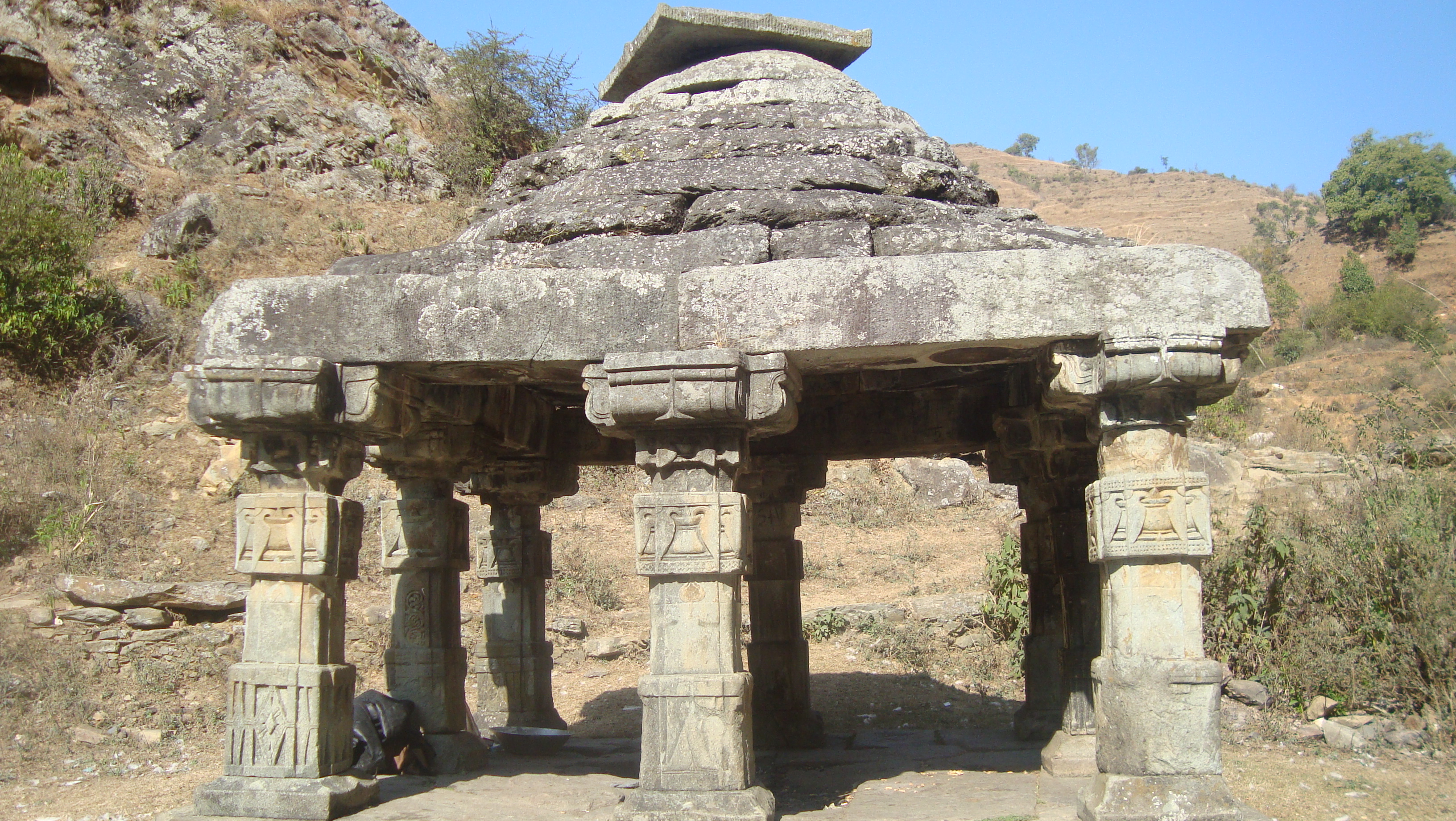 नेपाली: Ajayameharu kot ko Raja Baithak Sthal